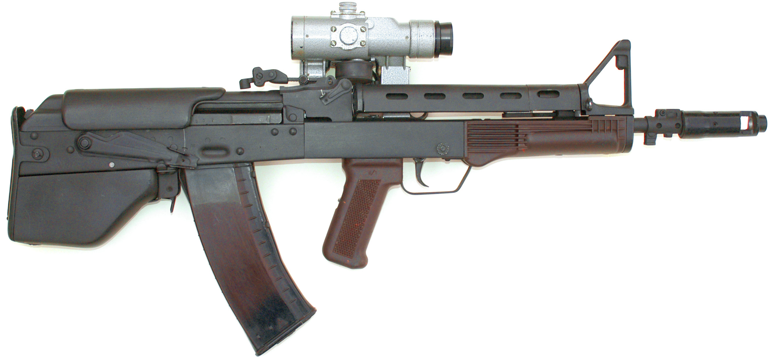 изображение автомата вепрь 1